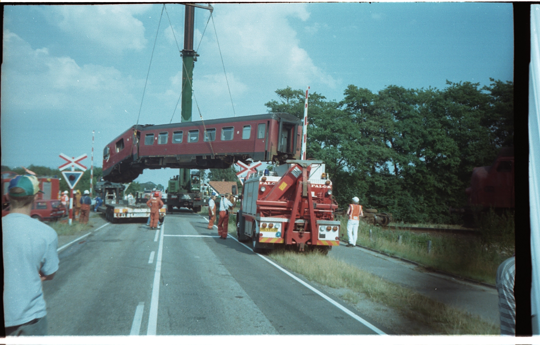 Foto af togulykken i jelling 1995